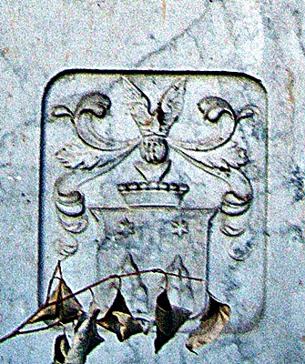 Wappen vom Epitaph des Bernhard von Eichthal (1784-1830), Campo Santo Teutonico Rom